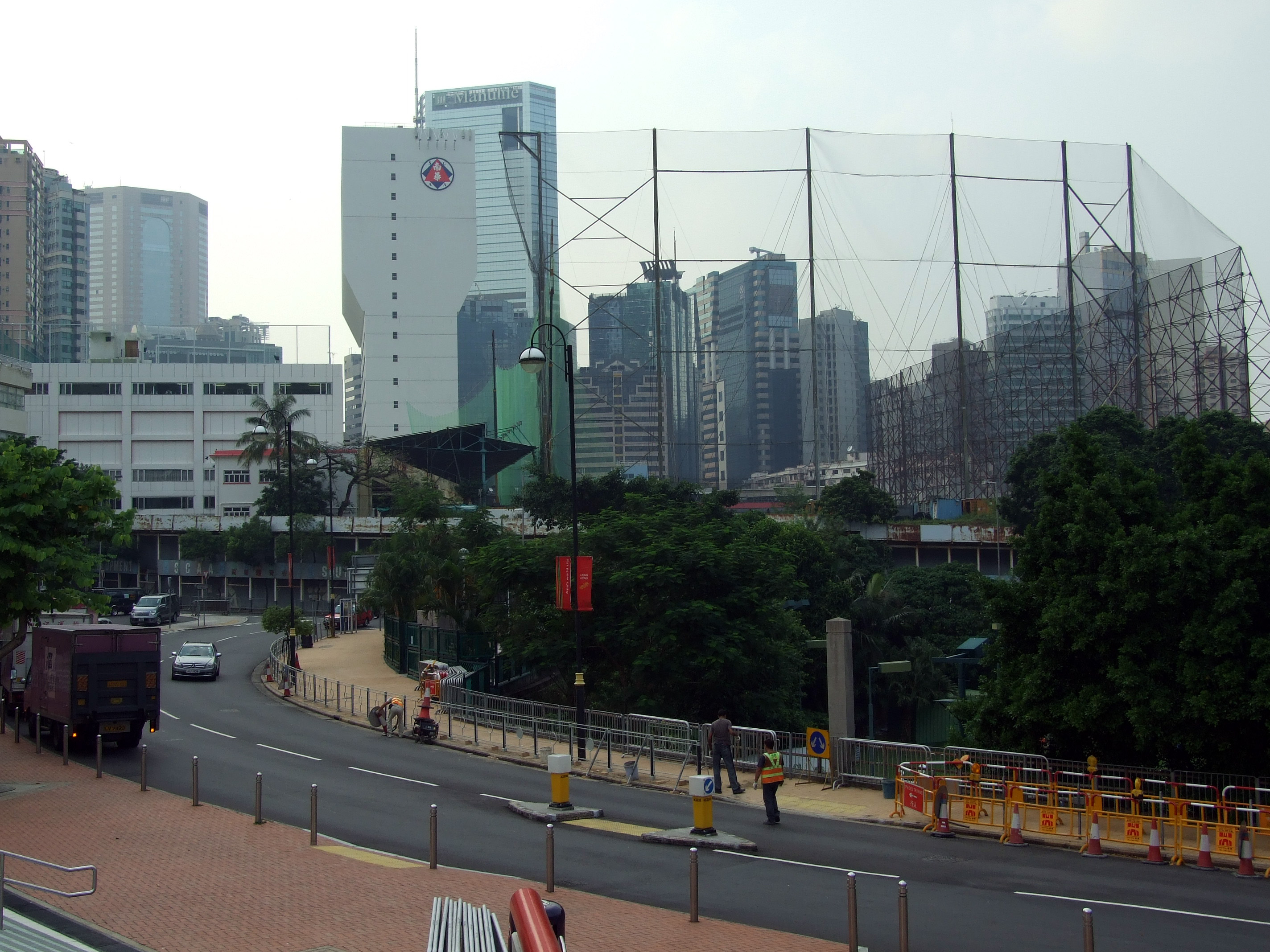 中文（香港）: 南華體育會香港會所